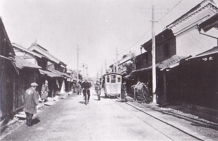 Abolished railway in Japan,Matsuyama Jinsha-kido(handcar railway).